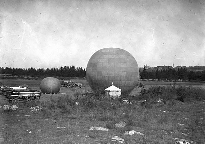 Parc aérostatique à Ormancey [Haute-Marne), ballons gonflés retenus à terre, photographie de presse Agence Rol